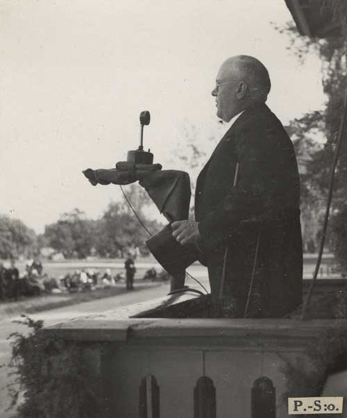 Maaherra Ignatius pitämässä Kotitalousnäyttelyn avajaispuhetta Väinölänniemellä.